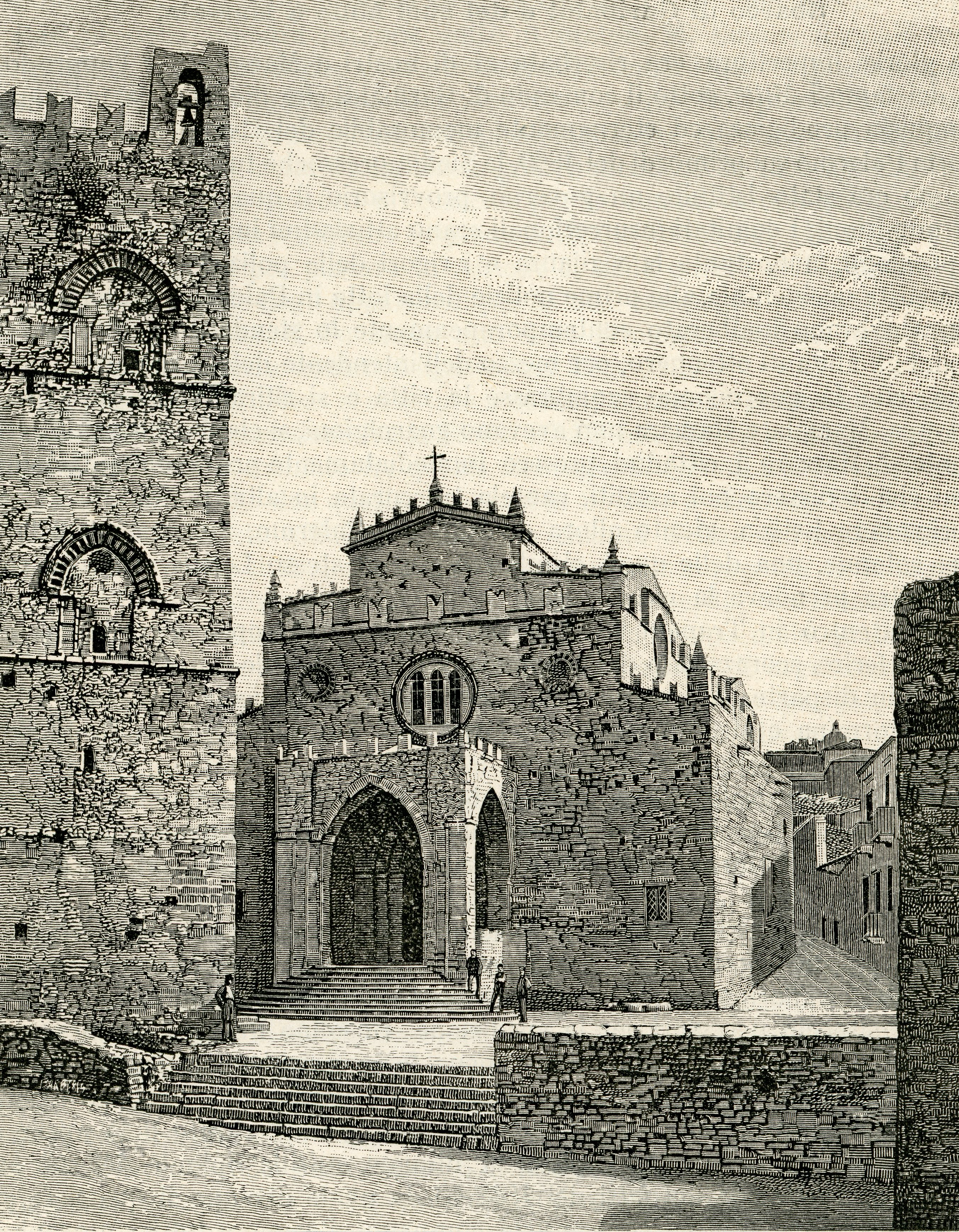 Monte San Giuliano: Duomo (xilografia di Barberis 1892).